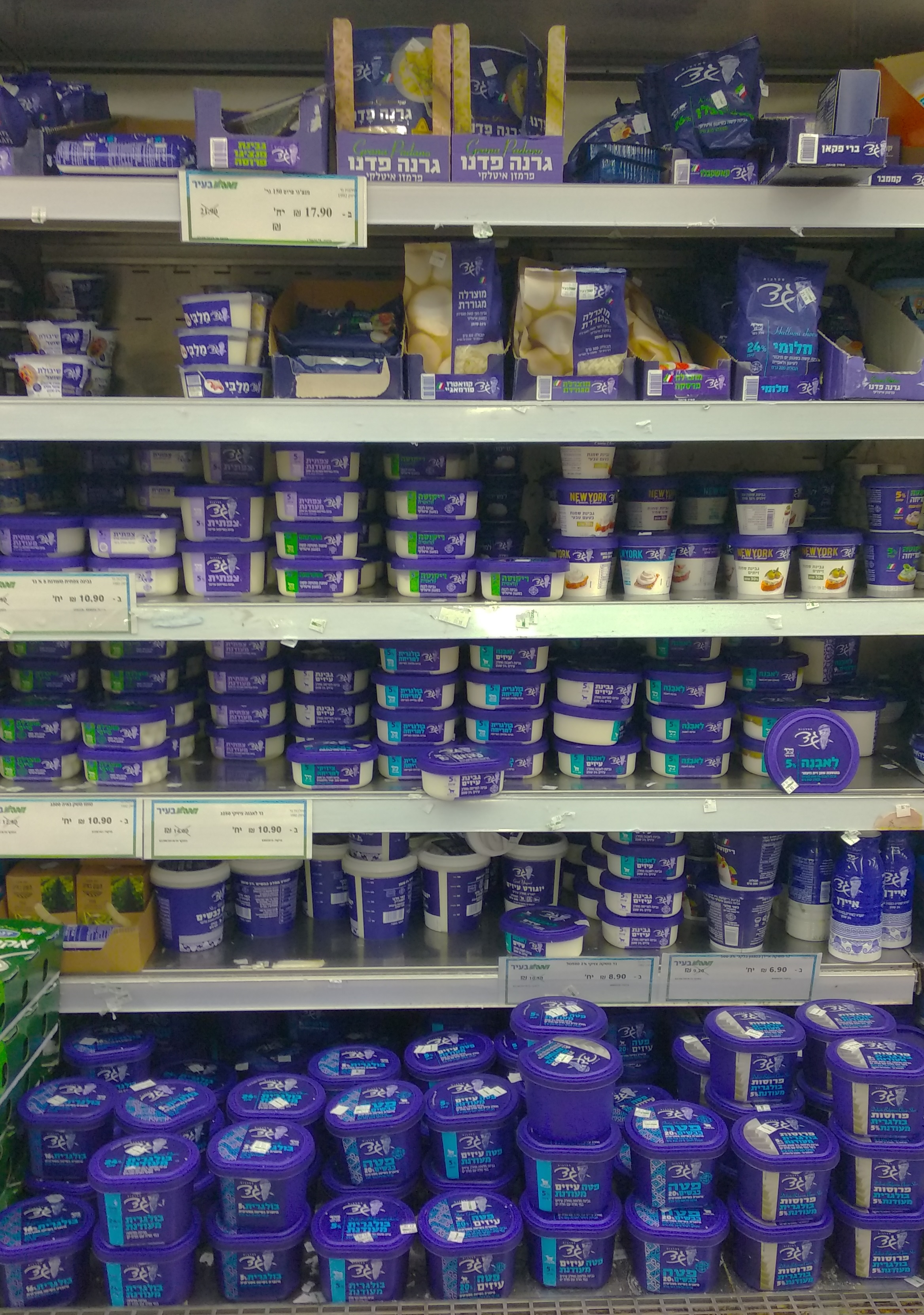 מוצרי מחלבות גד